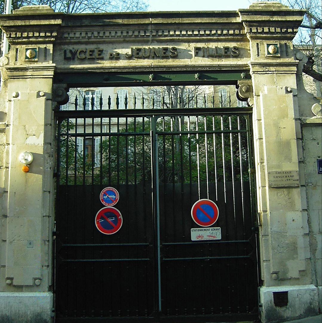 Portail donnant sur la cours d'honneur du Collège Longchamp.